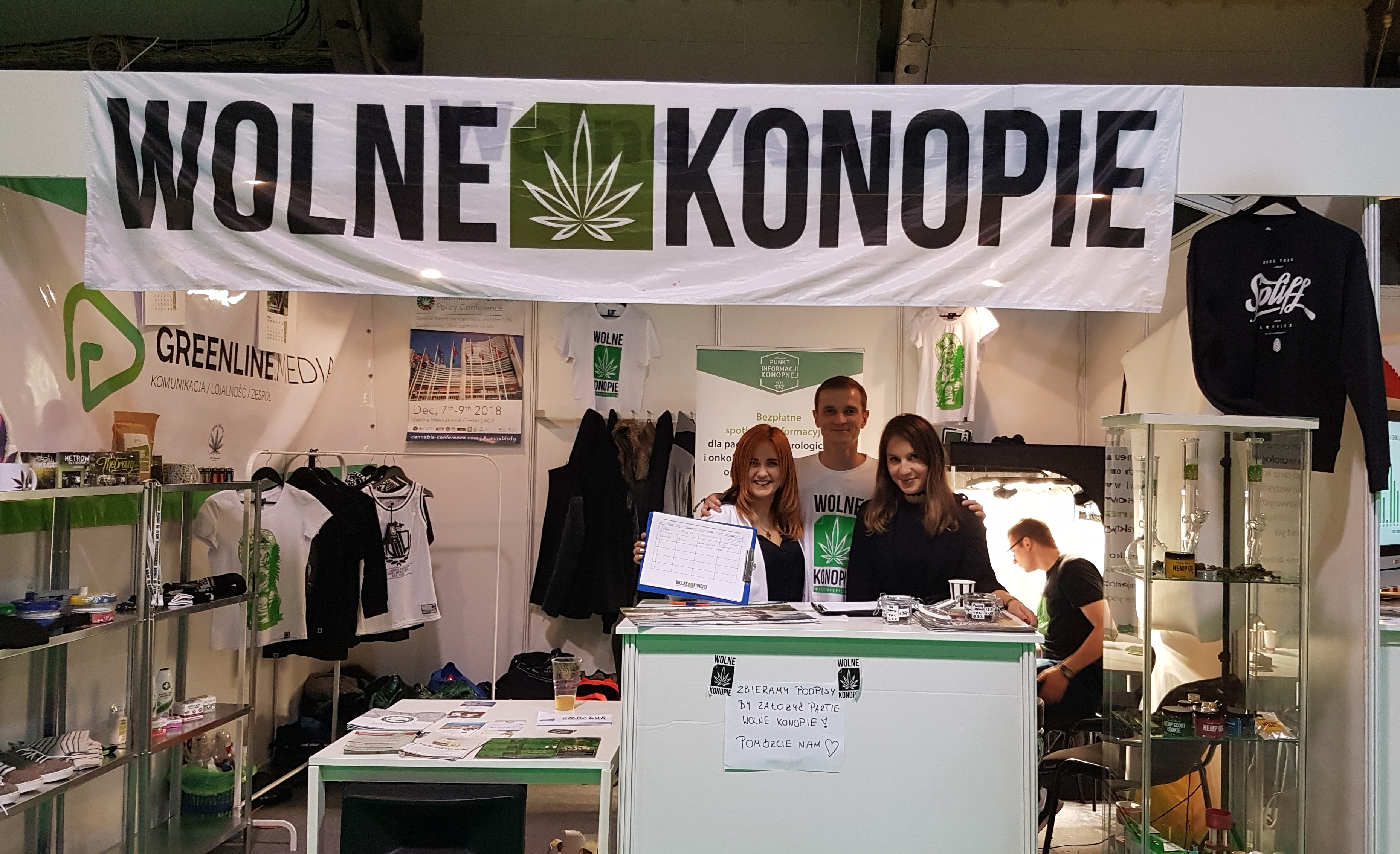 Zbieranie podpisów pod partią Wolne Konopie podczas targów Konopnych Cannafest w Pradze